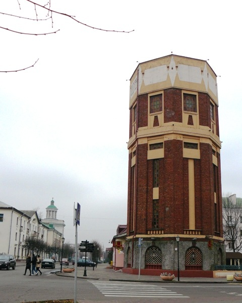 водонапорная башня (начало XX в.), Бобруйск, Фото путешествия по Беларуси.